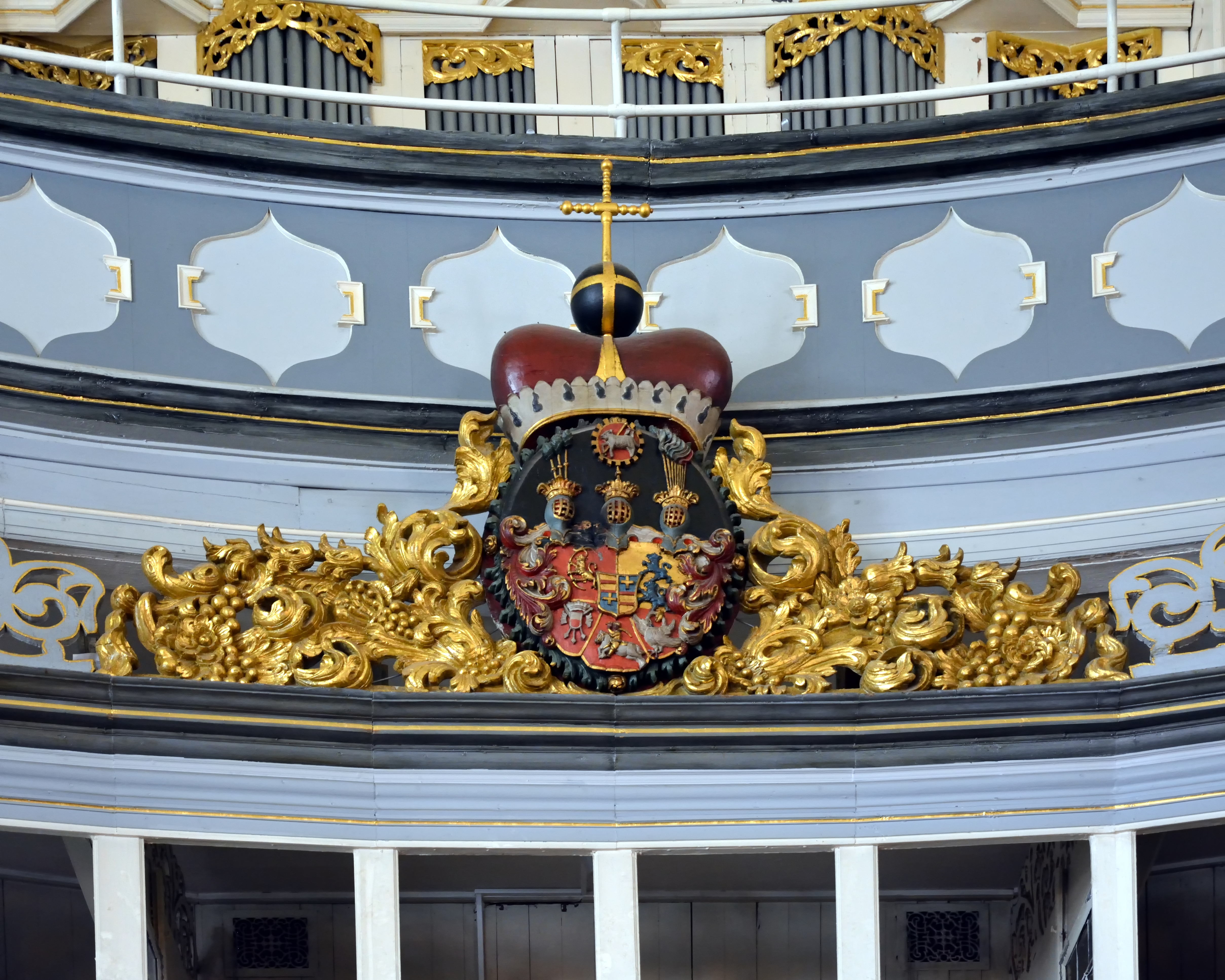 Impressionen aus dem Inneren der Stadtkirche St. Laurentii in Itzehoe Kartusche unterhalb der Orgel mit dem Wappen von Schleswig-Holstein-Sonderburg-Augustenburg